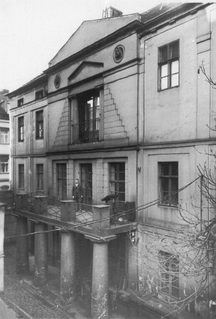 Dresden